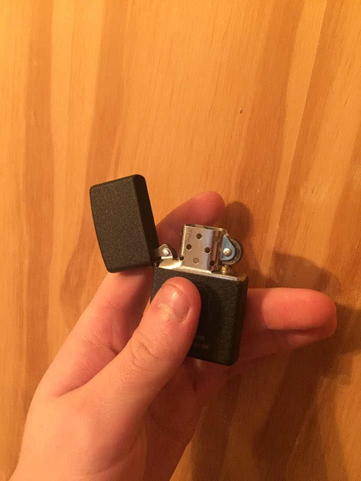 Zippo tulemasin